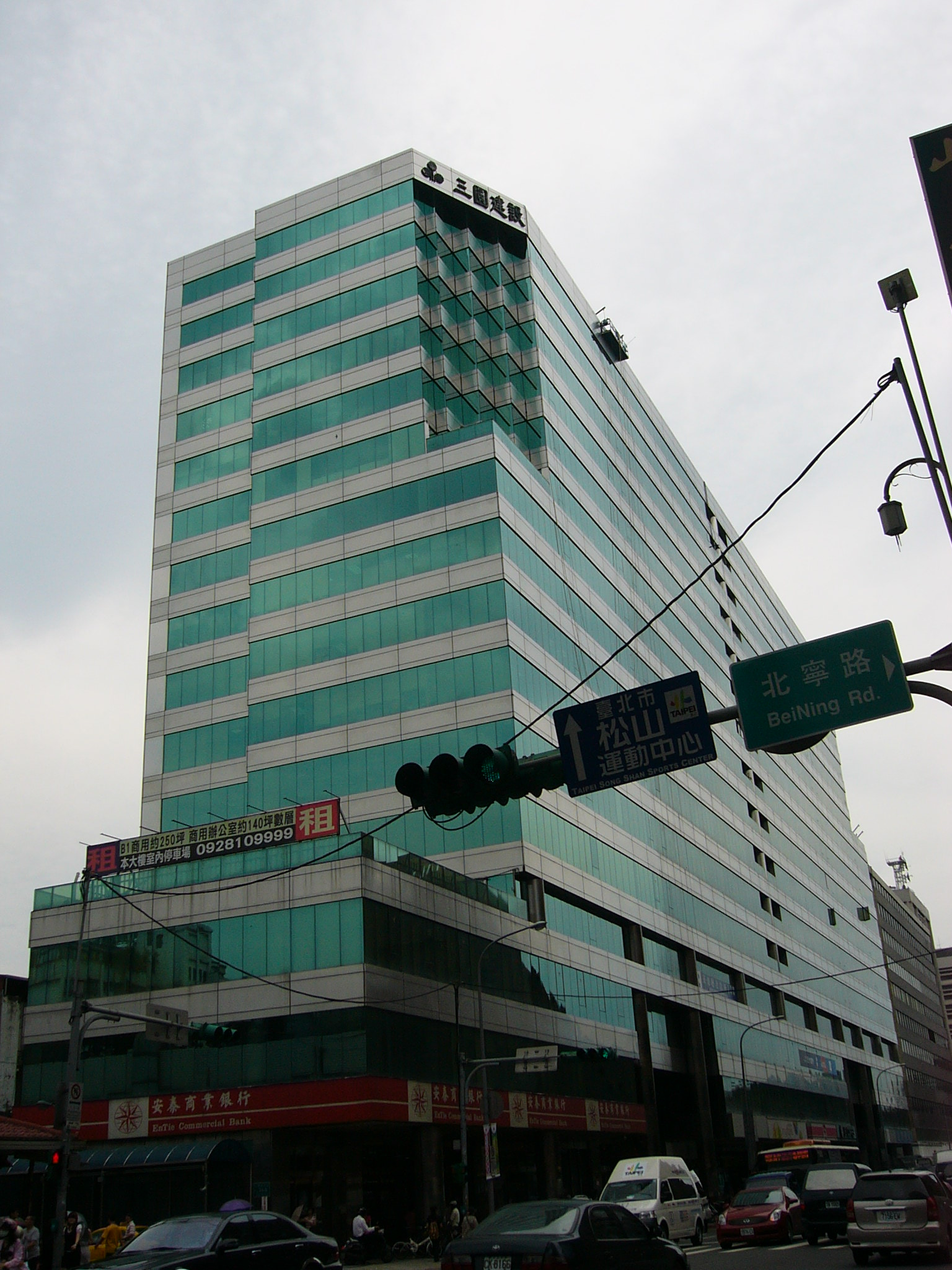 敦北長城大樓，三圓建設建造。民間全民電視公司總部在其14樓，安泰商業銀行中崙分行在其1樓。